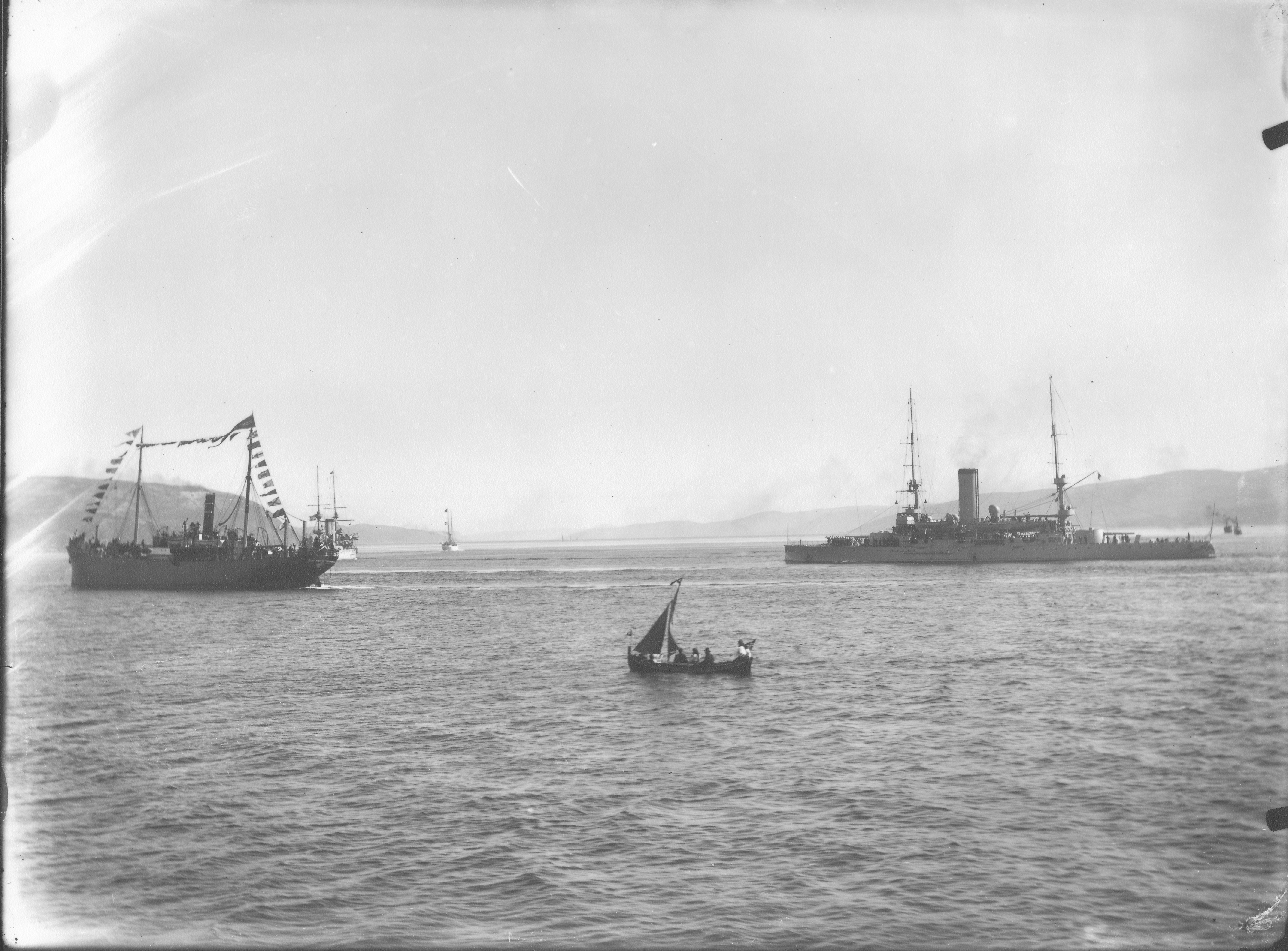 Fotograf: Sverre Bjerkan Til høyre panserskipet Harald Hårfagre ev. Tordenskiold. Norge ev. Eidsvoll skimtes bak D/S Kong Magnus. ref.: Levanger Museum, K5 LEB 0000 I 0386